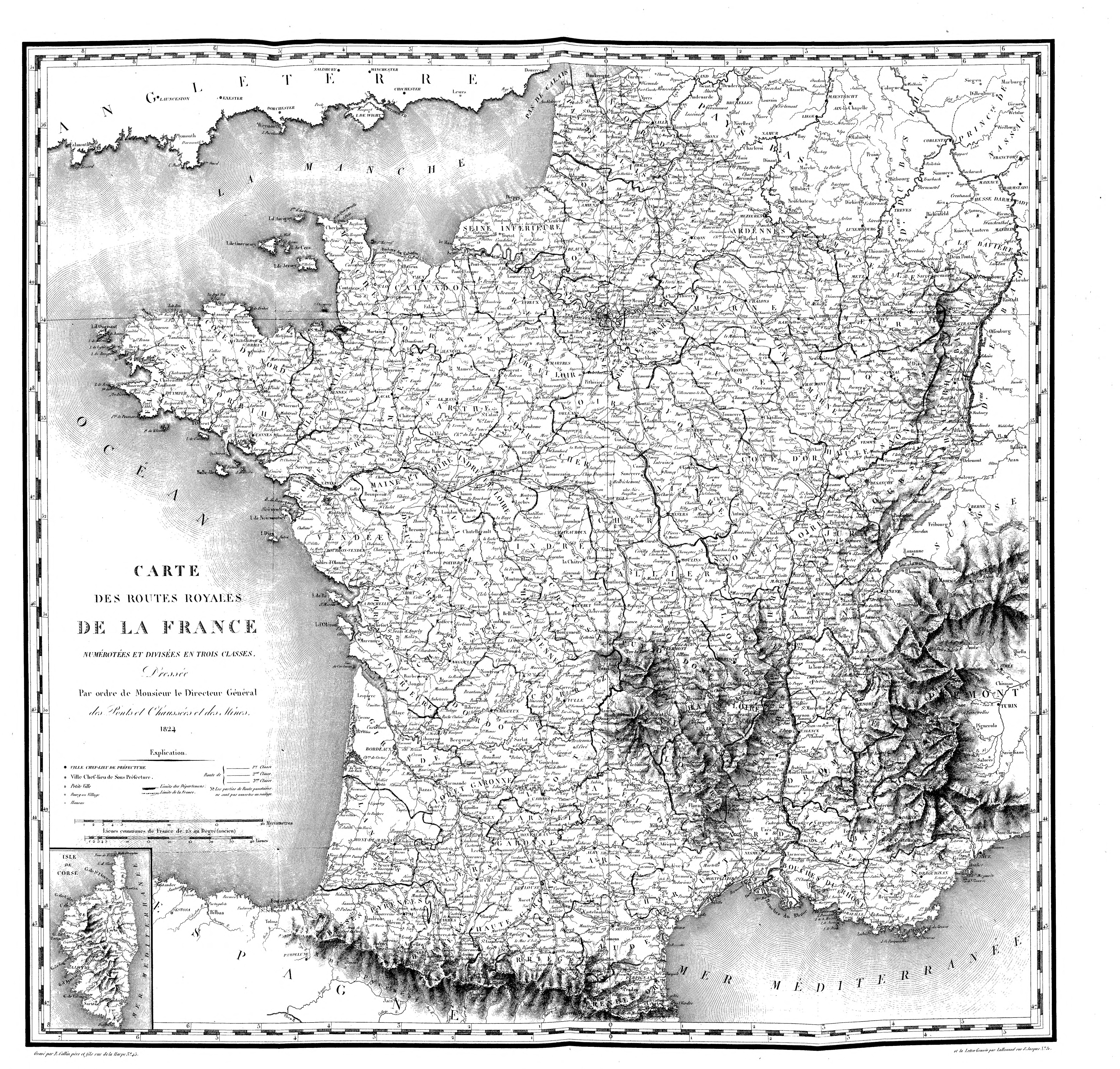 Carte des routes royales de la France Carte extraite de Statistique des routes royales de France, 1824 (contributeur : Louis Becquey (1760-1849) ; éditeur : Imprimerie royale, Paris) [1]